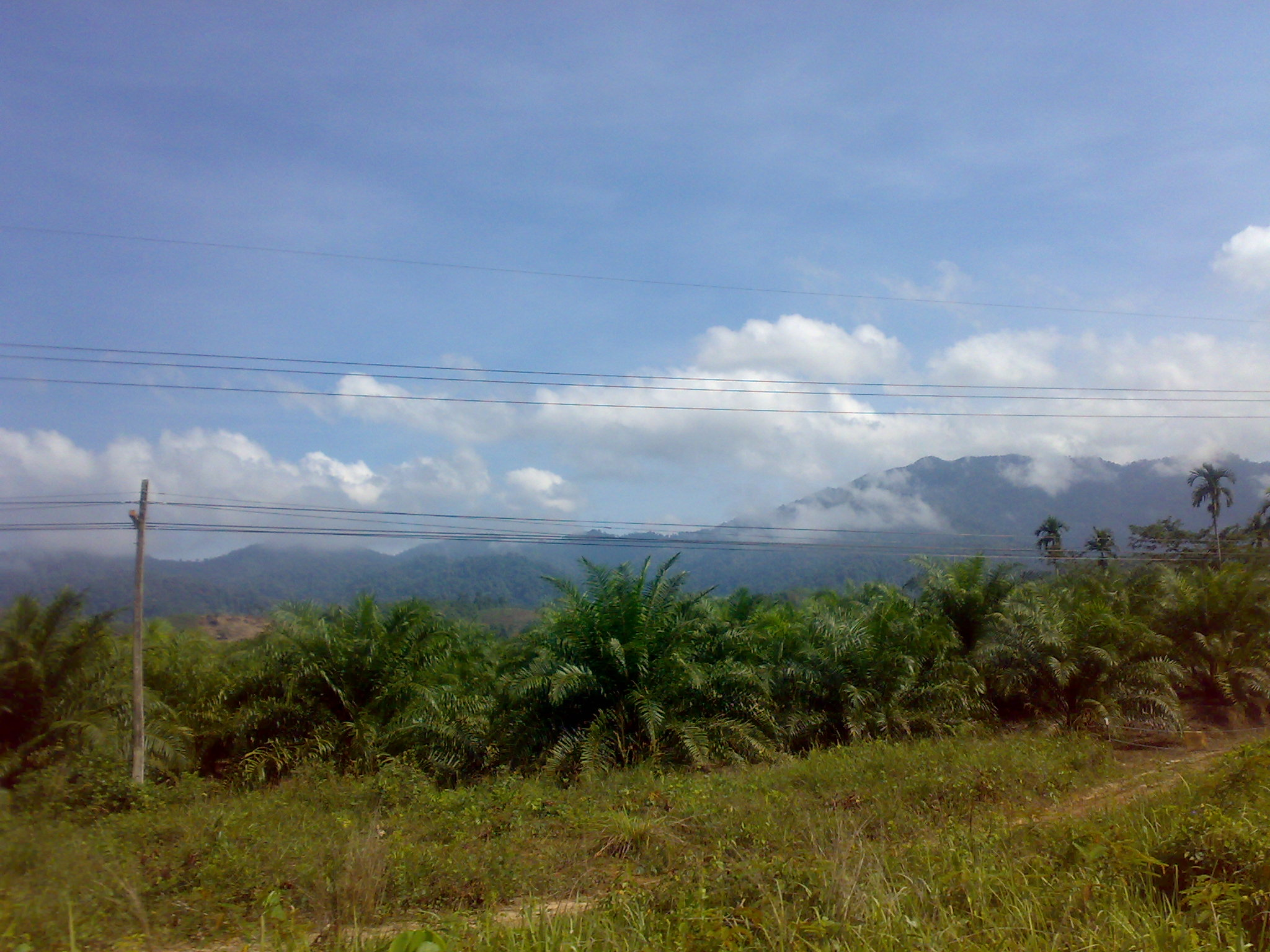 Mountains in Kapong, Phang Nga, Thailand